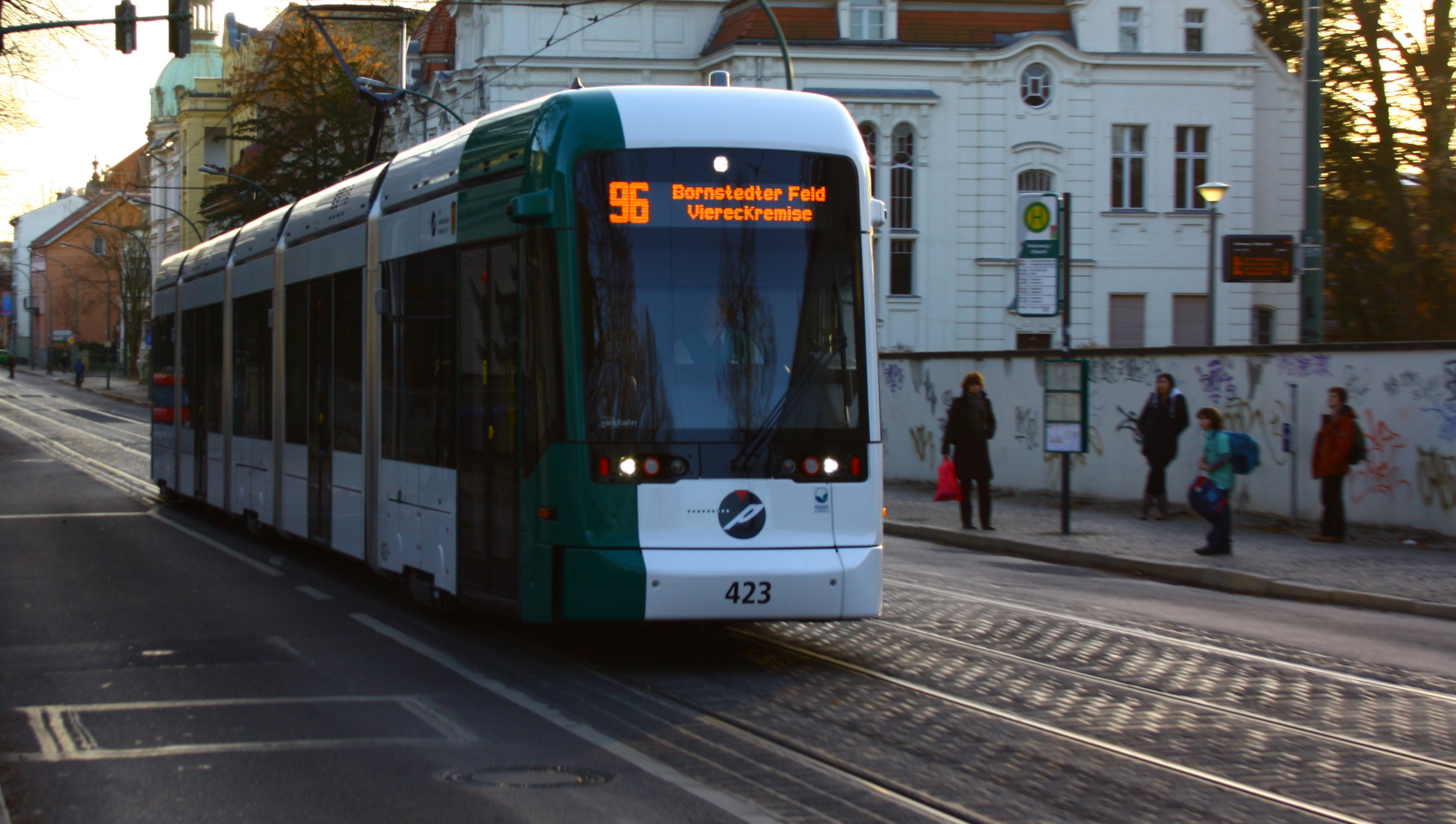 Variotram an der Haltestelle Reiterweg/Alleest